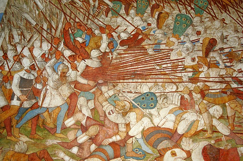 Schlachtfresko (von Manuel/Wägmann/Balmer): Arnold v.Winkelried